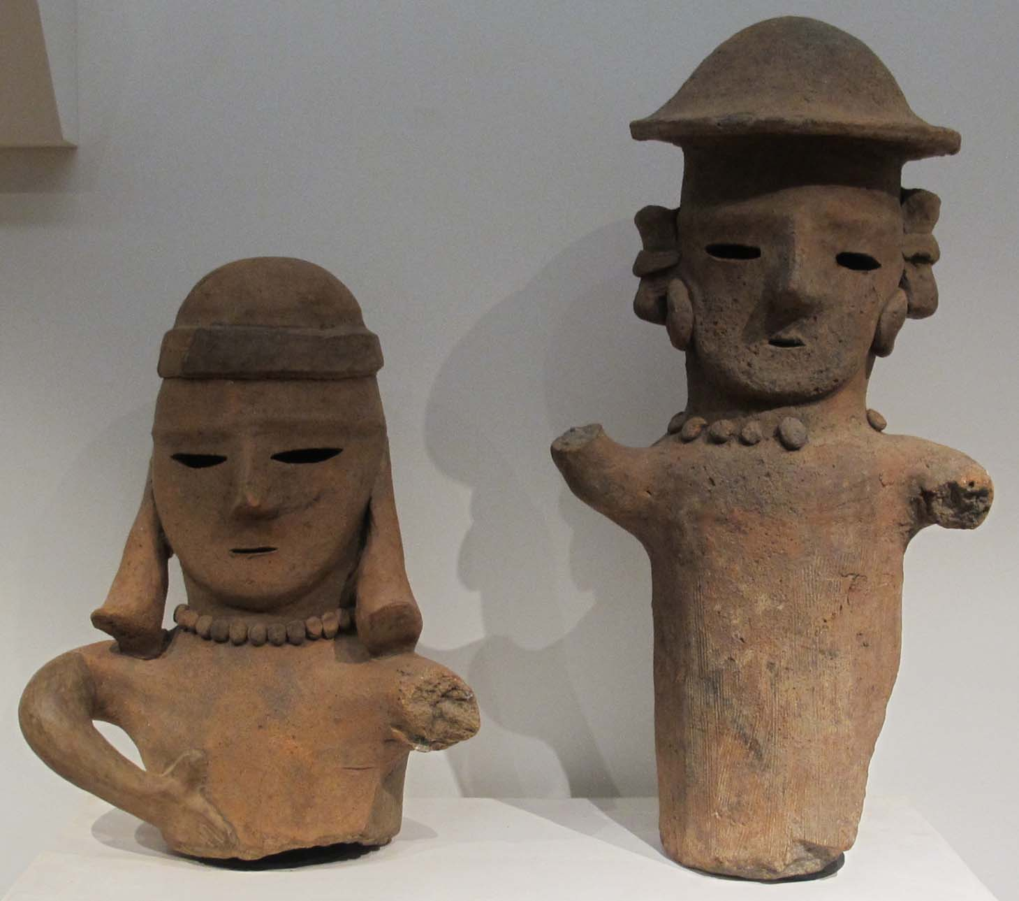 Kofun, busti maschile e femminile haniwa, VI sec